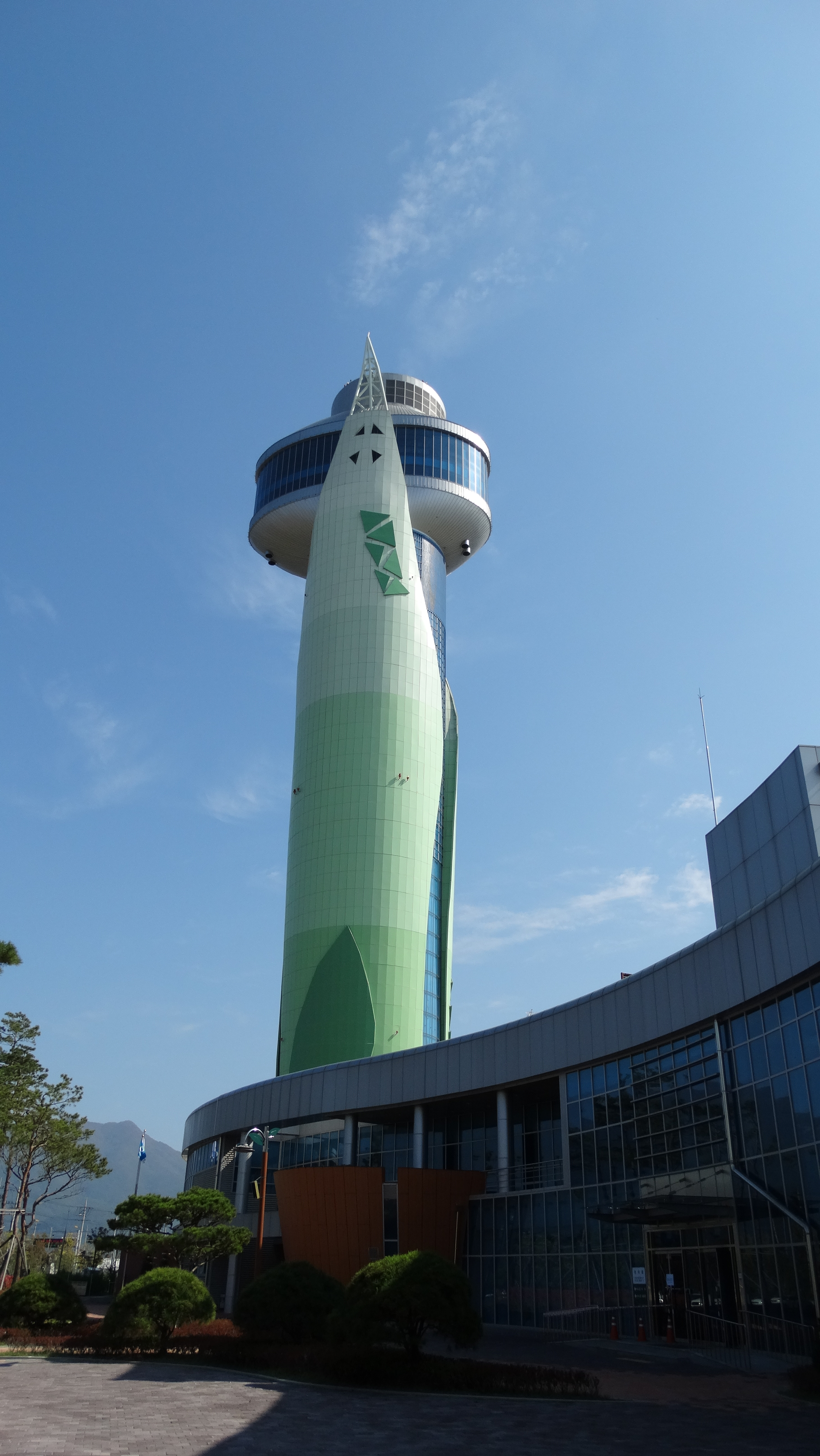 유니온 타워 (1)